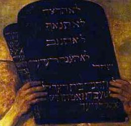 detail